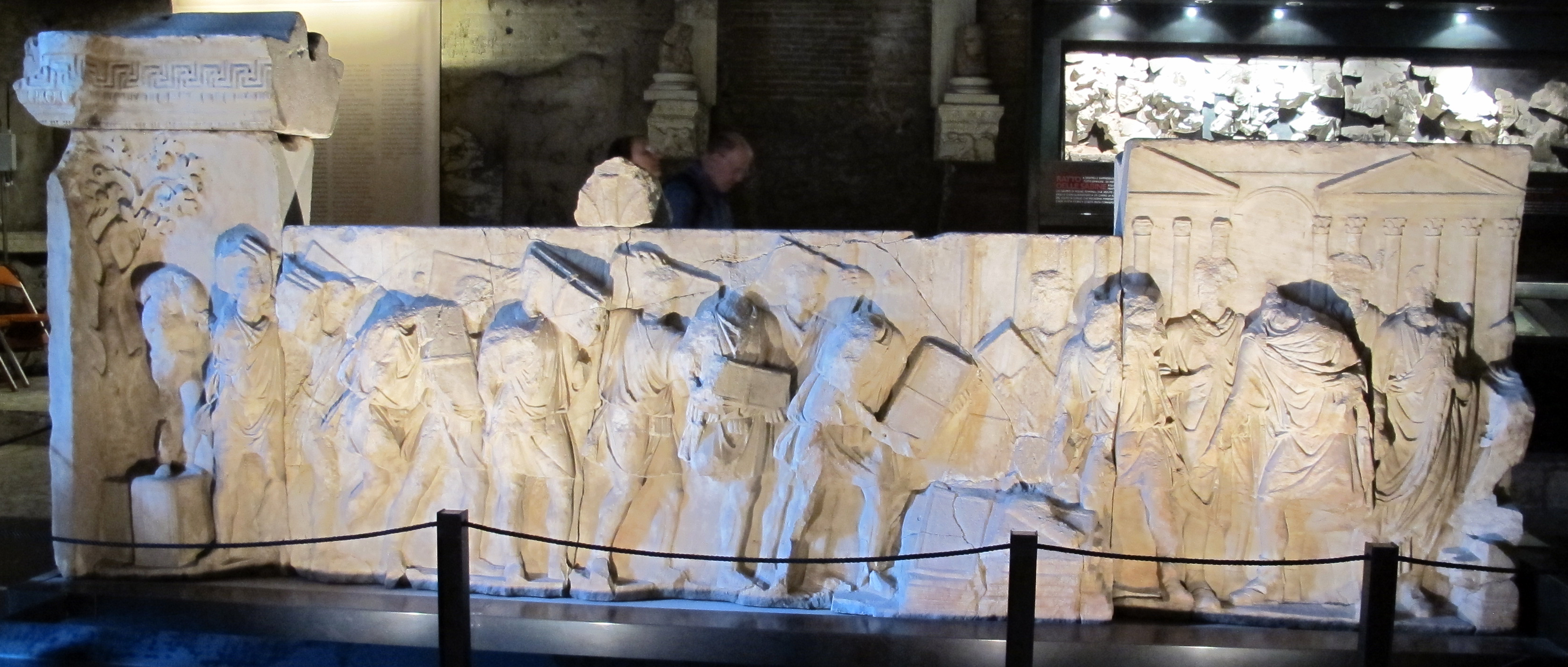 Curia Iulia - Roma